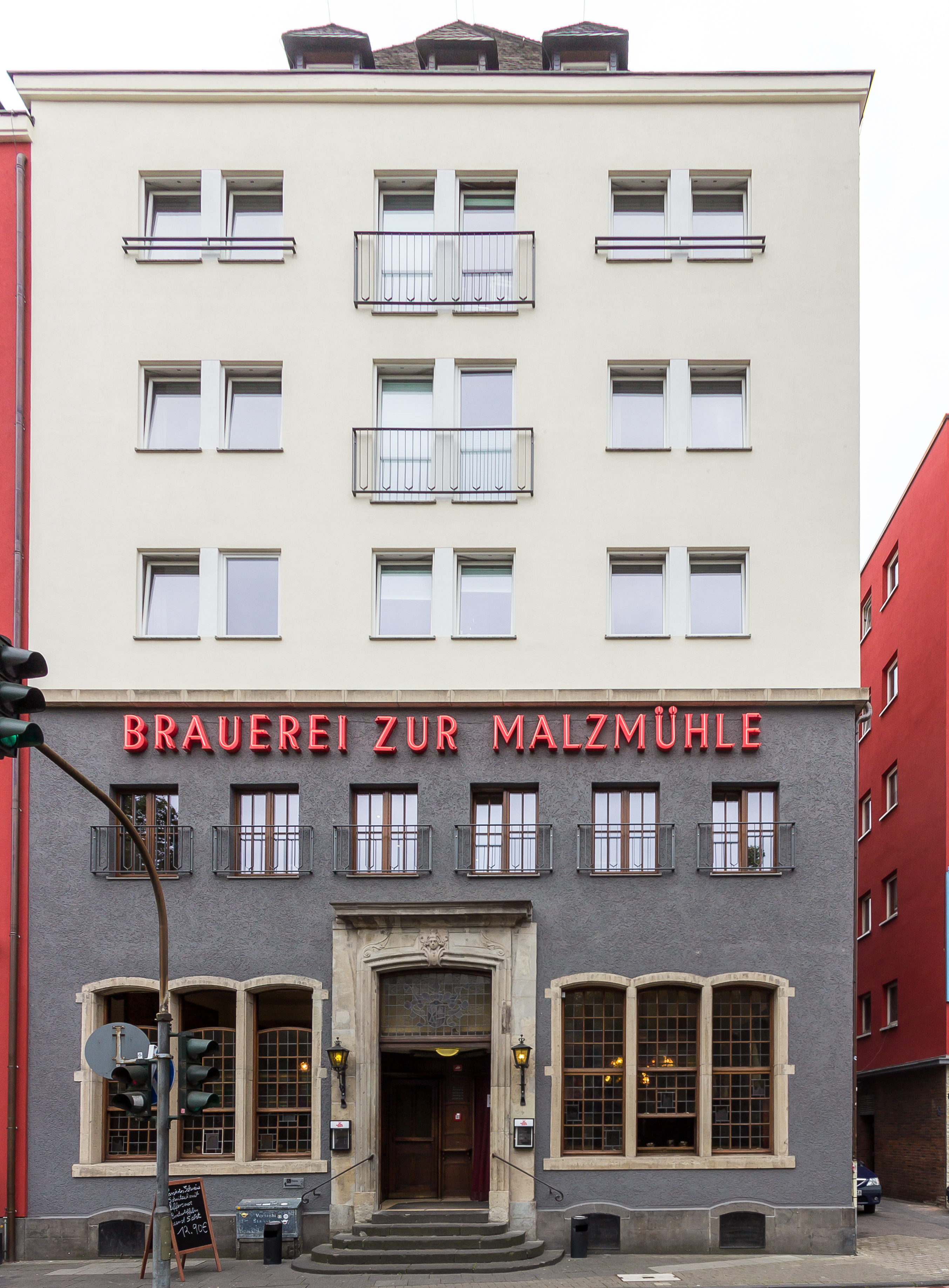 Brauerei zur Malzmühle, Köln This is a photograph of an architectural monument.